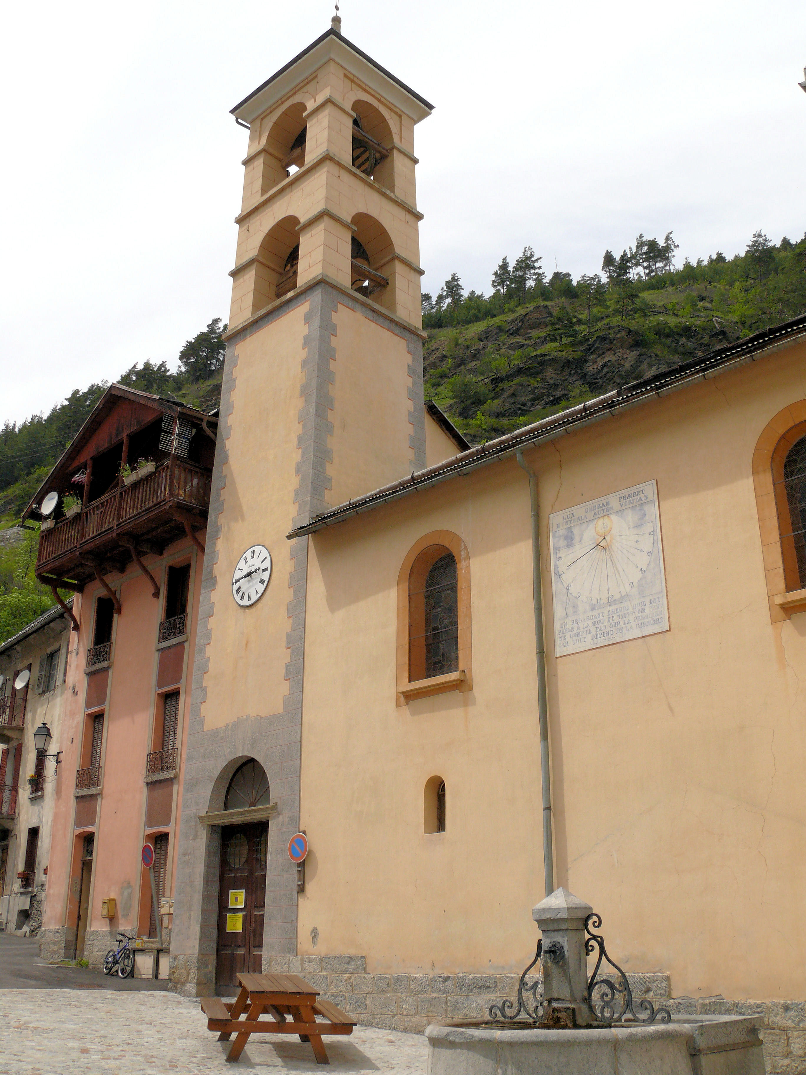 Château-Ville-Vieille - Eglise de Château-Queyras